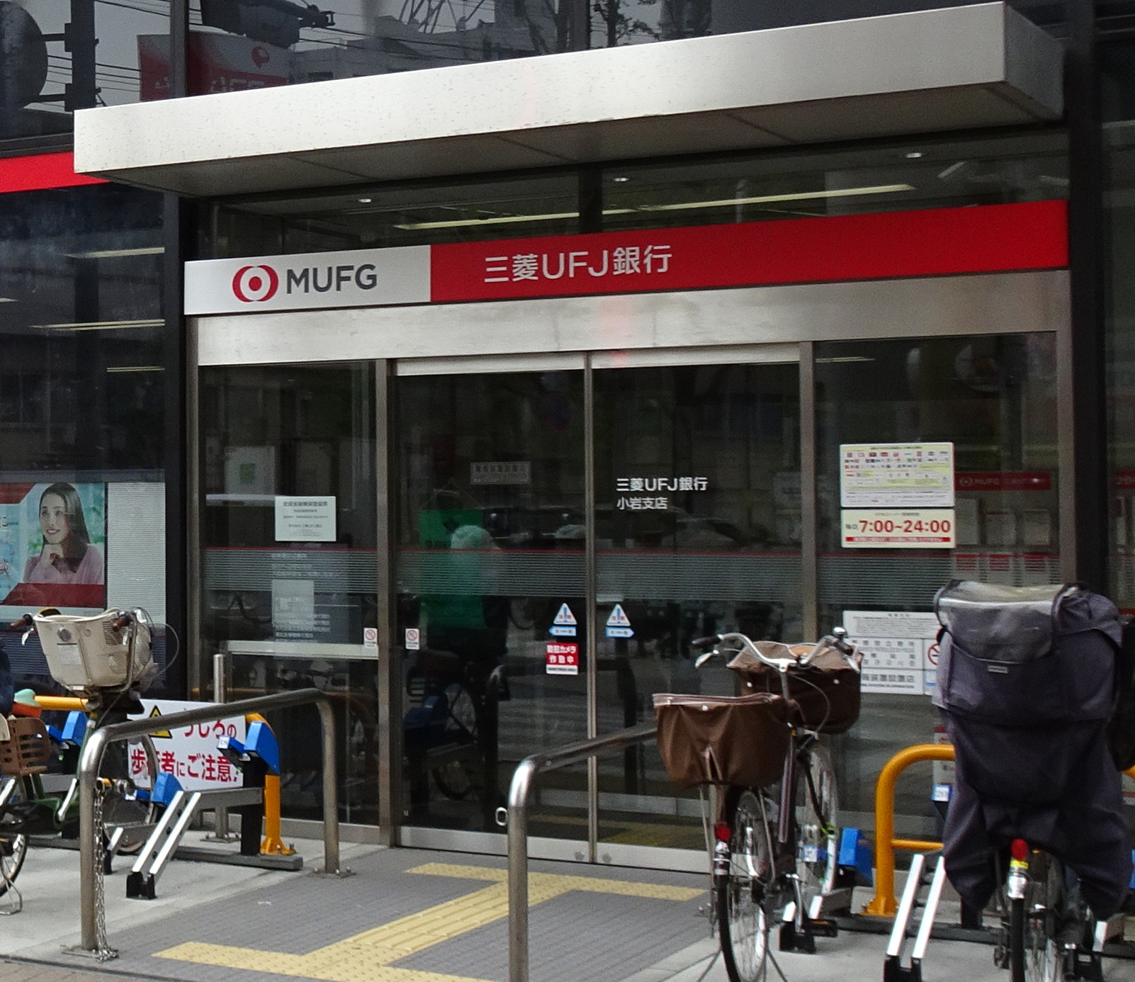 ＪＲ総武線小岩駅前にある三菱UFJ銀行小岩支店 2018年4月24日